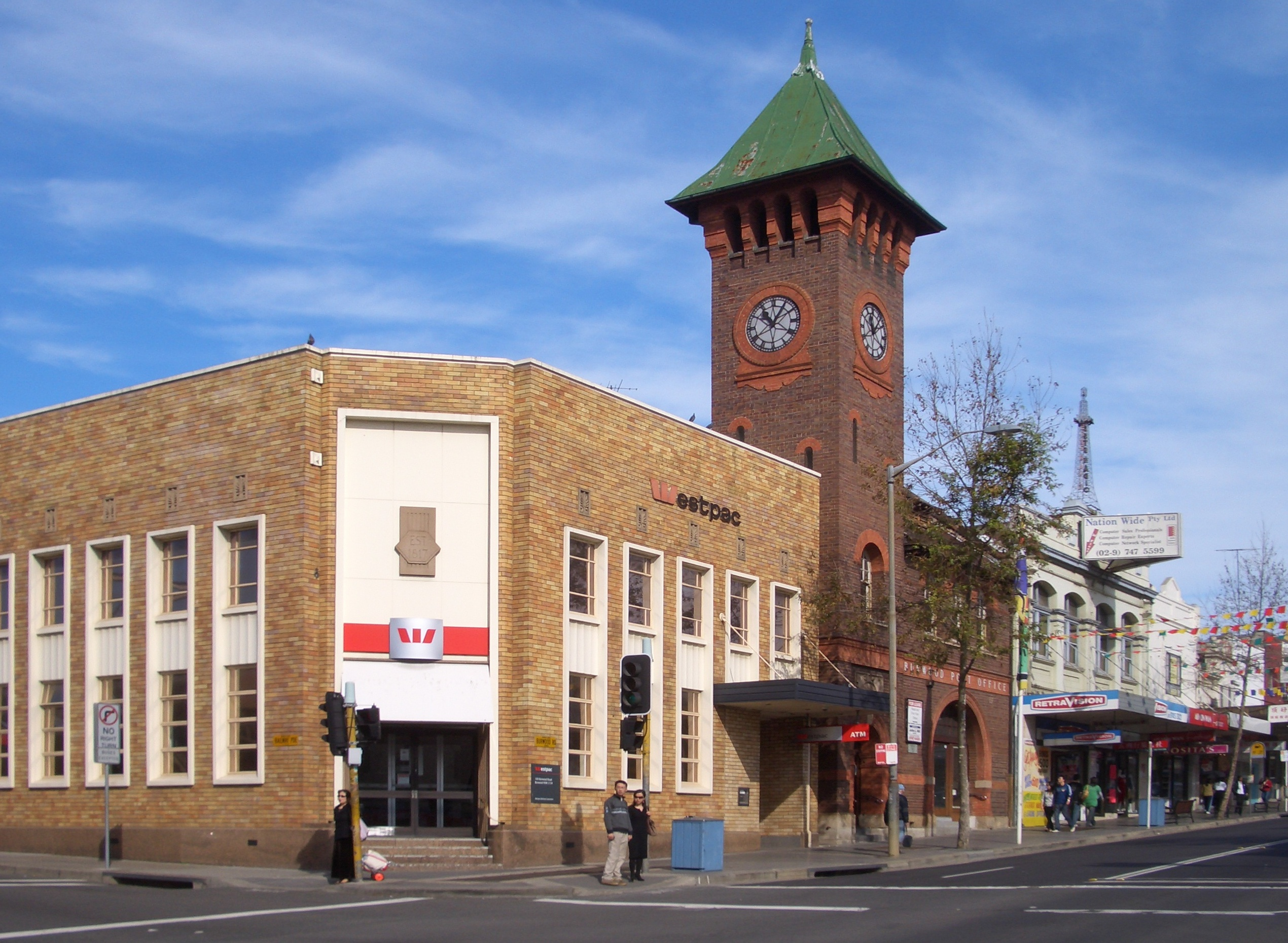 Burwood Road, Burwood